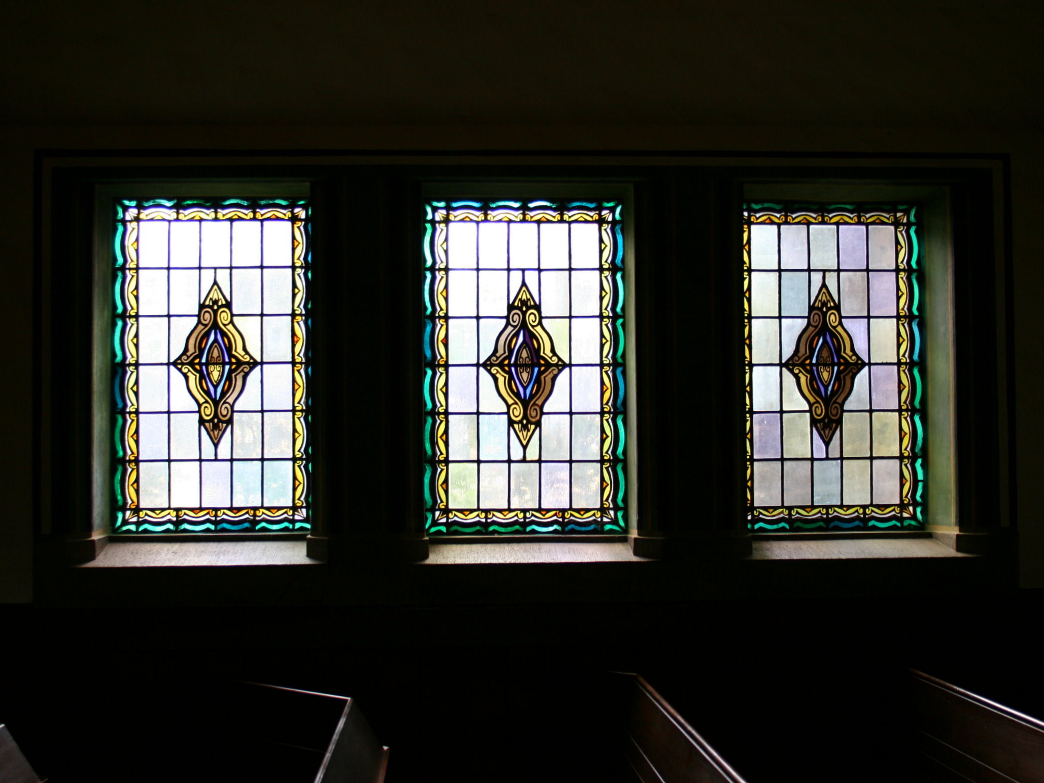 Hauptkirche Sonnborn in Wuppertal-Sonnborn